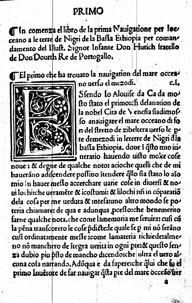 Montalboddo, Paesi_novamente_retrovati 1507, first page of narrative by Alvise da Ca' da Mosto